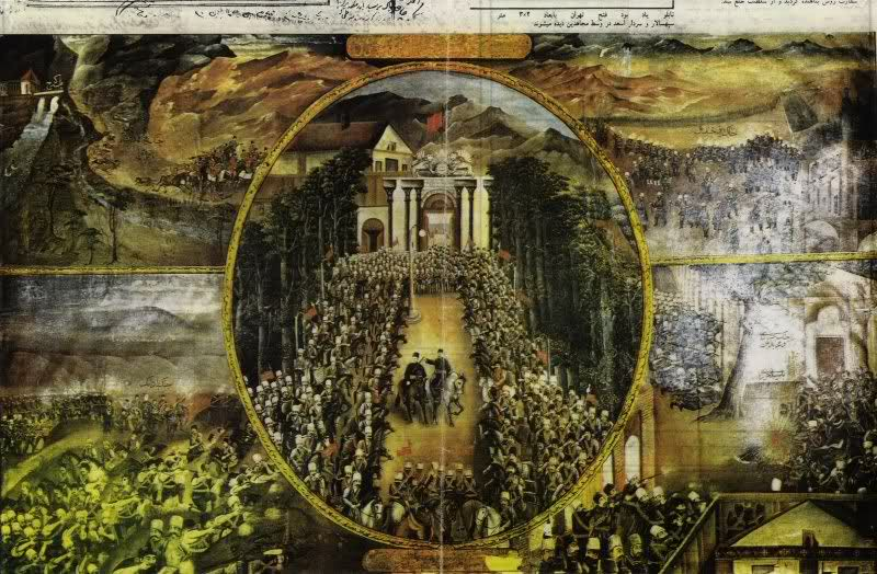 تابلوی پنجگانه «فاتحین تهران» که امروزه در کاخ صاحبقرانیه جای گرفته است.، این تابلو به شيوه روايتي مرسوم زمانه رخدادهای این جنبش اجتماعی را روایت کرده است.